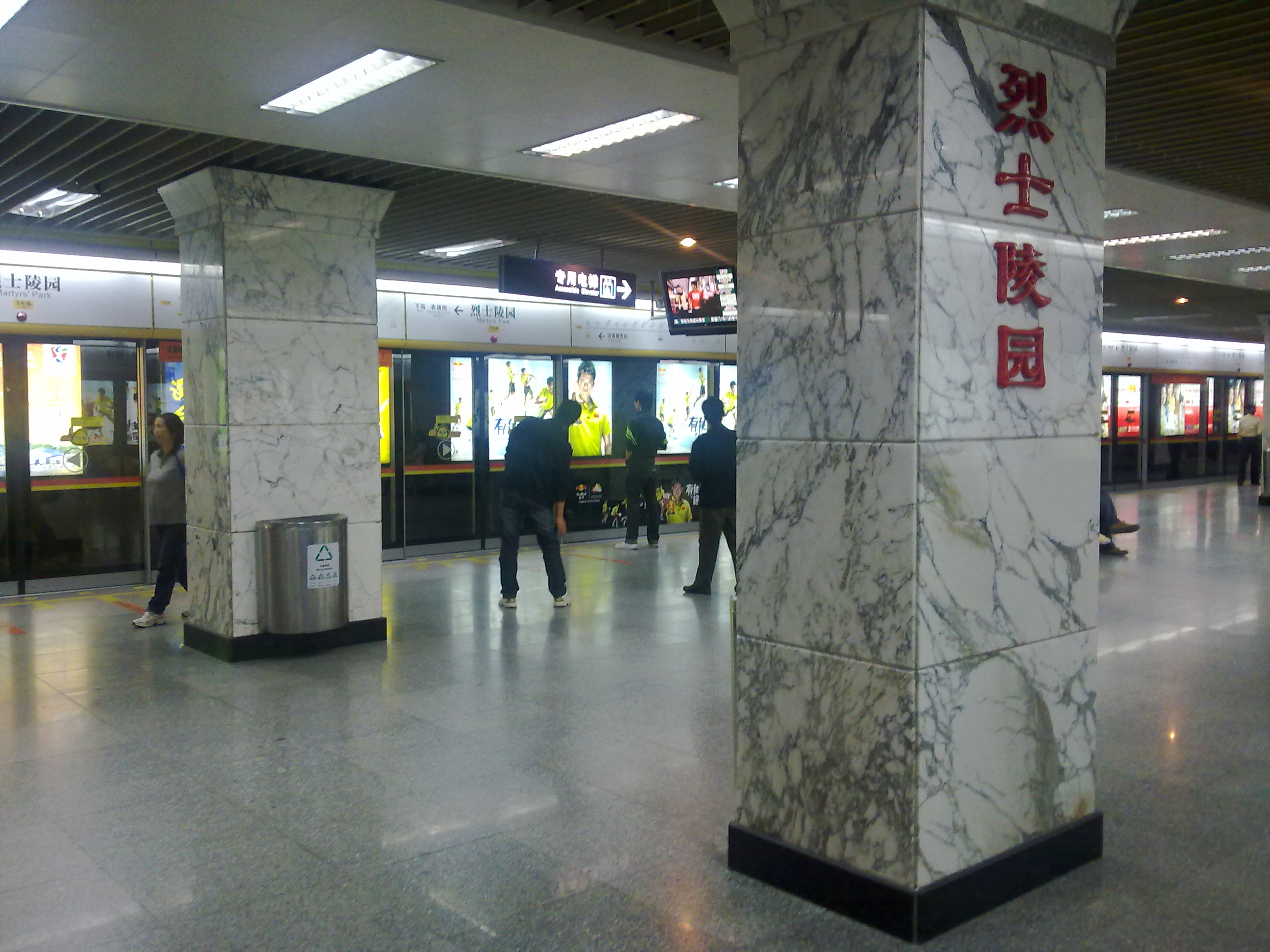 廣州地鐵烈士陵園站站台